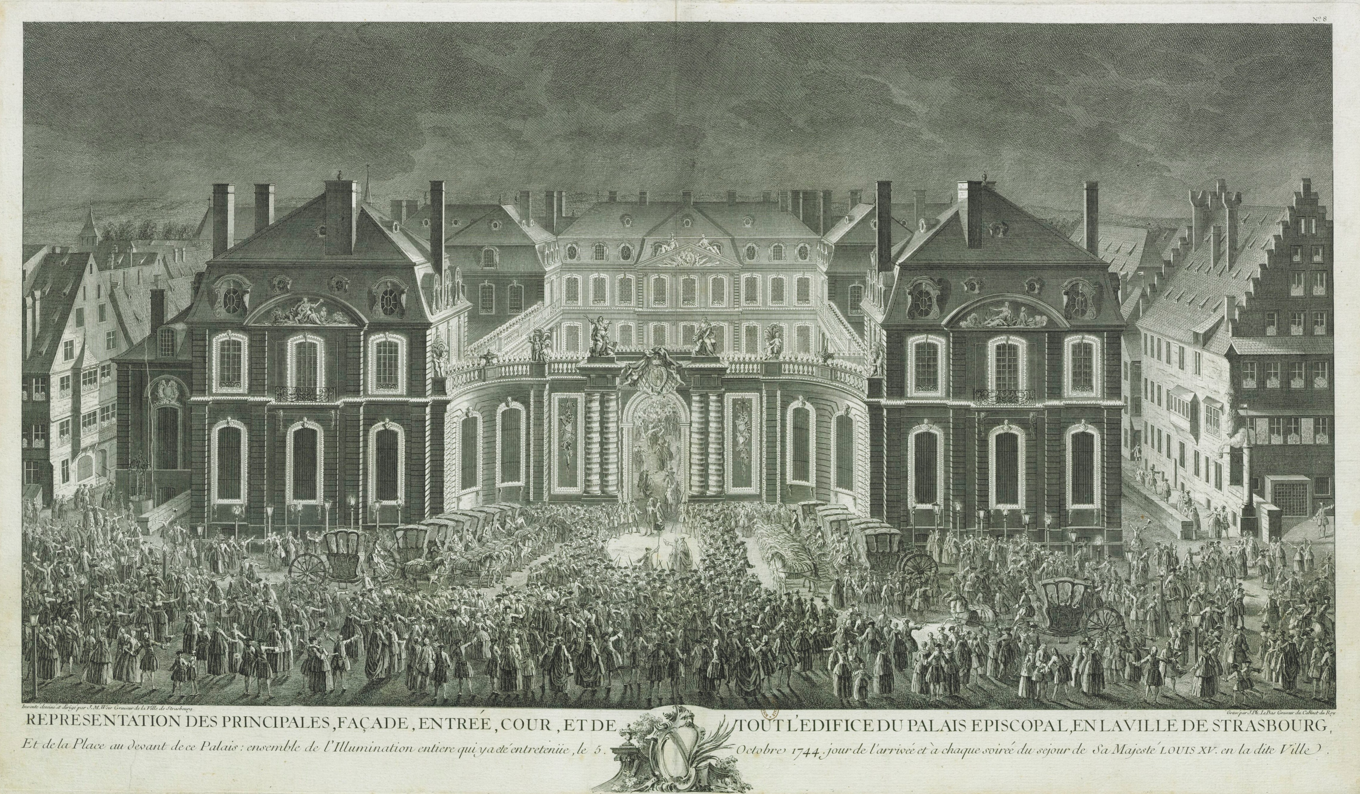 Représentation des principales façade, entrée, cour et de tout l'édifice du Palais épiscopal, en la ville de Strasbourg, et de la place au devant de ce Palais : ensemble de l'illumination entière qui y a été entretenue, le 5 octobre 1744, jour de l'arrivée et à chaque soirée du séjour de Sa Majesté Louis XV en la dite ville, estampe.